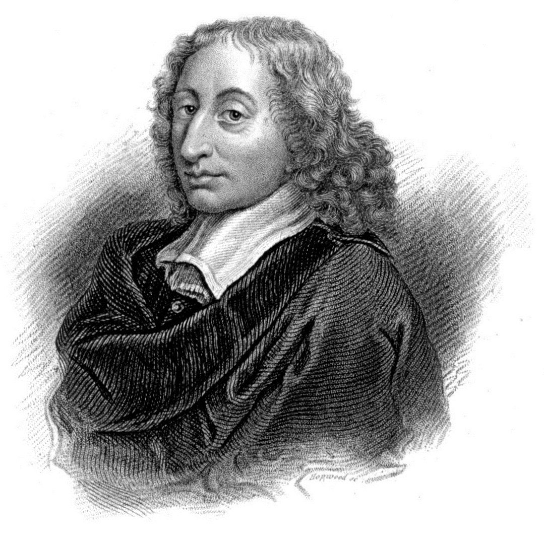 Blaise Pascal. Illustration de "Histoires des météores", p. 135